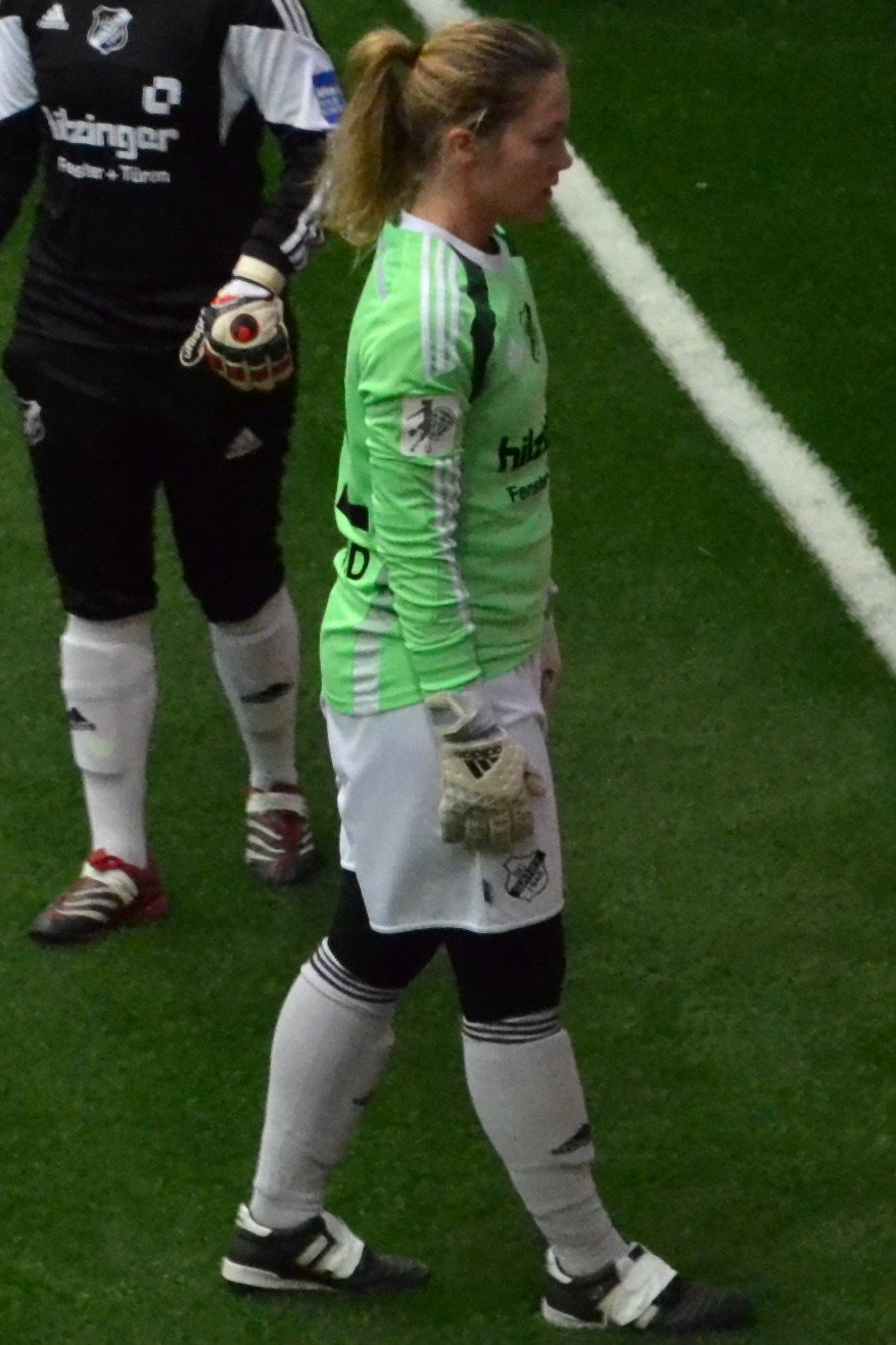 Sabrina Lang (SC Sand) beim SAP Frauen-FußballCup 2016